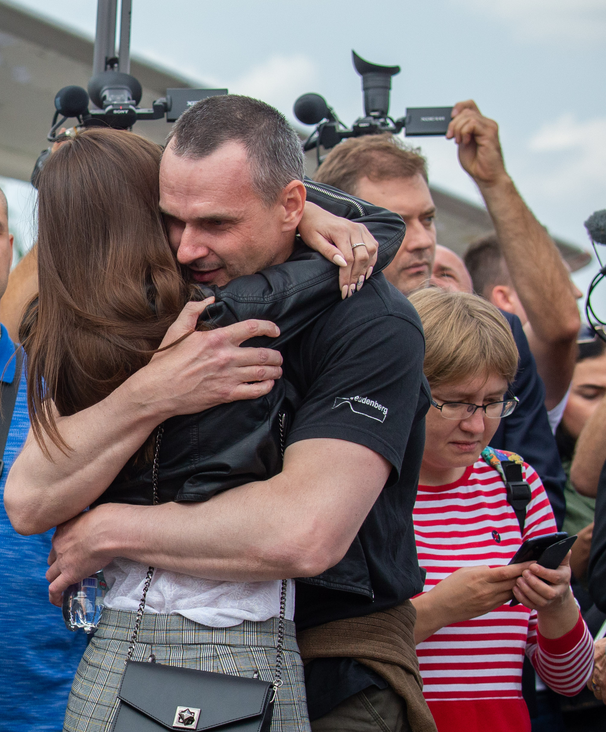 Oleh Sentsov return